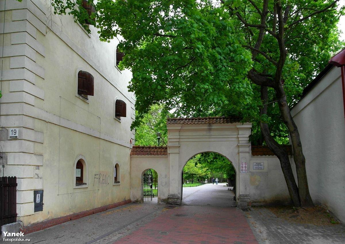 Brama do pocysterskiego zespołu pałacowego a także do parku. Wejście od strony ul. Cystersów, choć właściwiej winno brzmieć, od ul. bpa Edmunda Nowickiego. Z lewej strony Spichlerz Opacki, dziś Muzeum Etnograficzne.